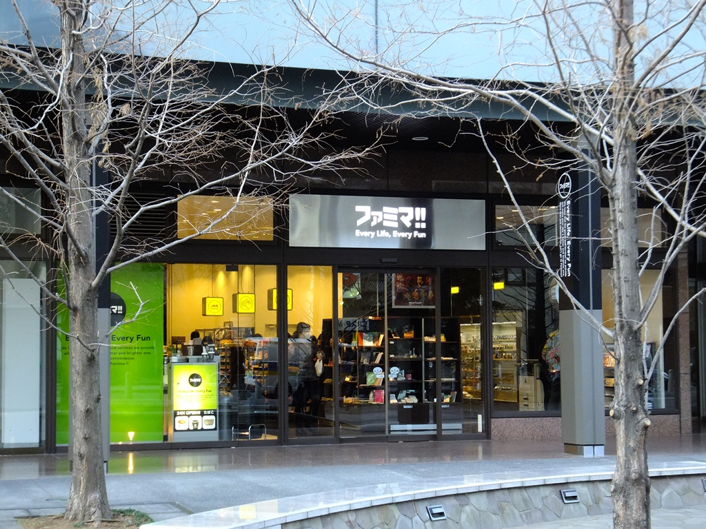 ファミリーマートの新しい店舗形態である「ファミマ!!」の画像。